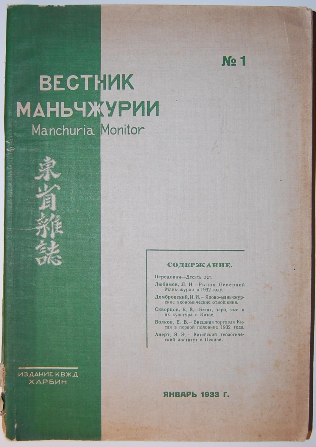 Обложка журнала Вестник Маньчжурии